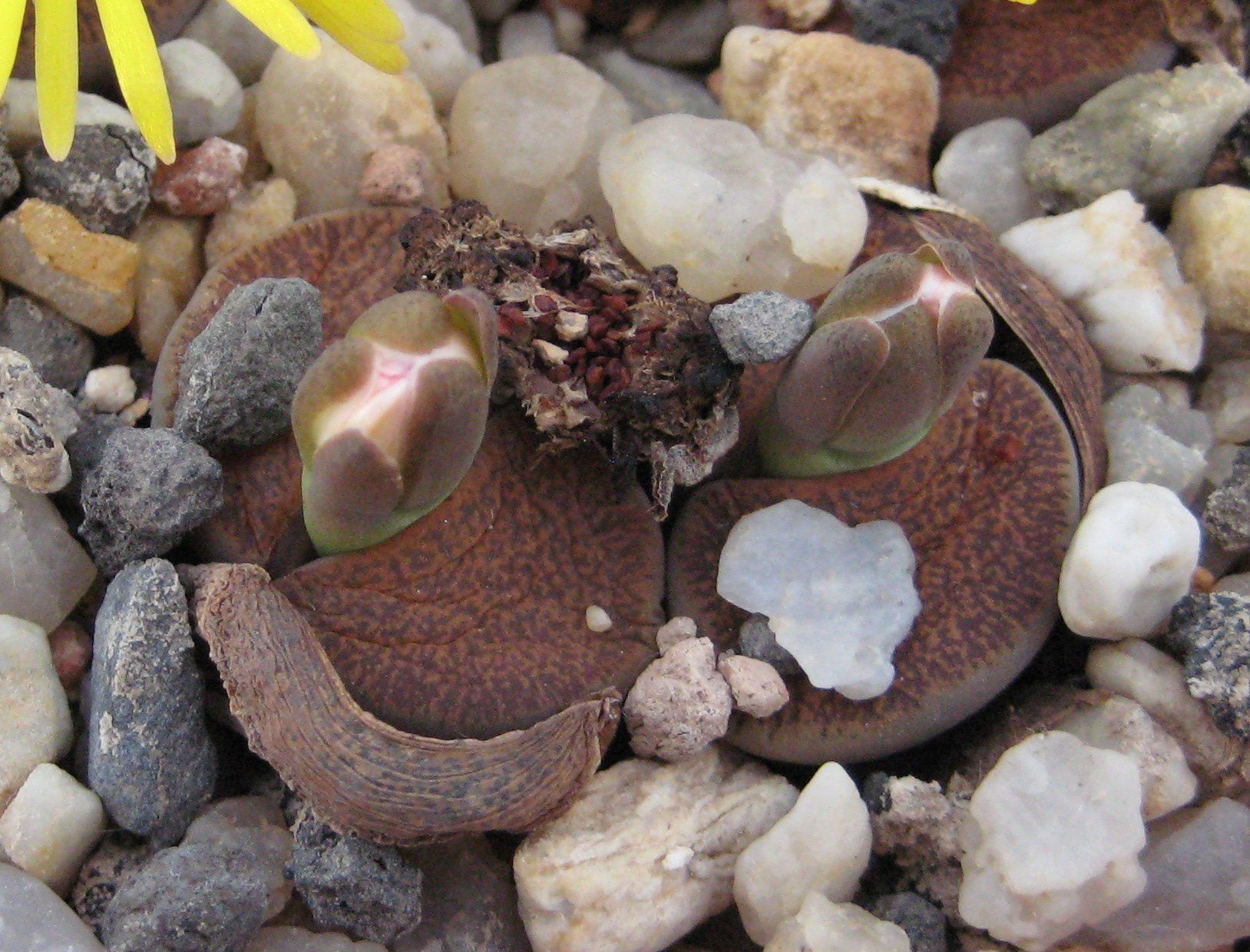 Lithops lesliei ssp. lesliei v. mariae Cole-Nr. 141 in Kultur